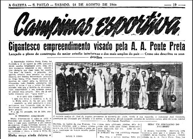 Reportagem do jornal "Gazeta", sobre a construção do Estádio Moisés Lucarelli, que foi concretizada 8 anos depois. Na imagem aparece o próprio Moisés e outros personagens importantes na história da Ponte, como José Cantúsio, Olimpio Dias Porto e outros envolvidos na construção do que na época era o 3º maior estádio do Brasil.